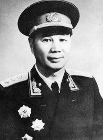 杨成武授衔礼服照